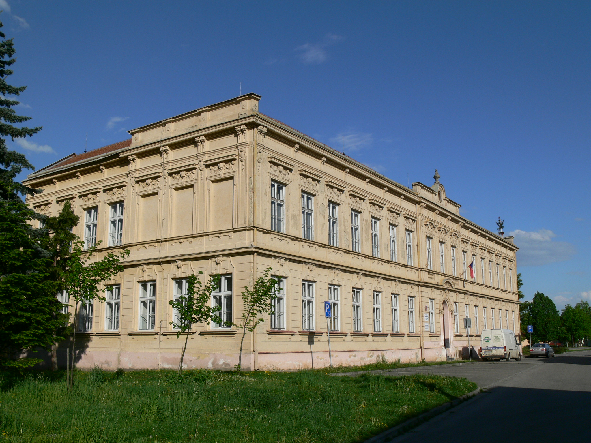 Dědice, střední zdravotnická škola